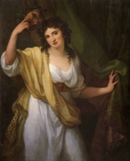 Angelika Kauffmann: Lady Hamilton als Komische Muse (1791)